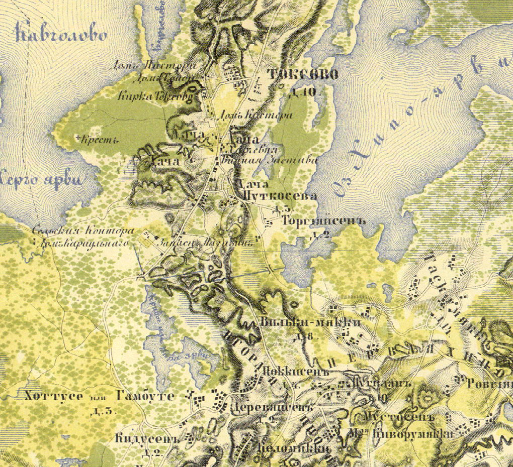 Село Токсово на карте 1860 года.